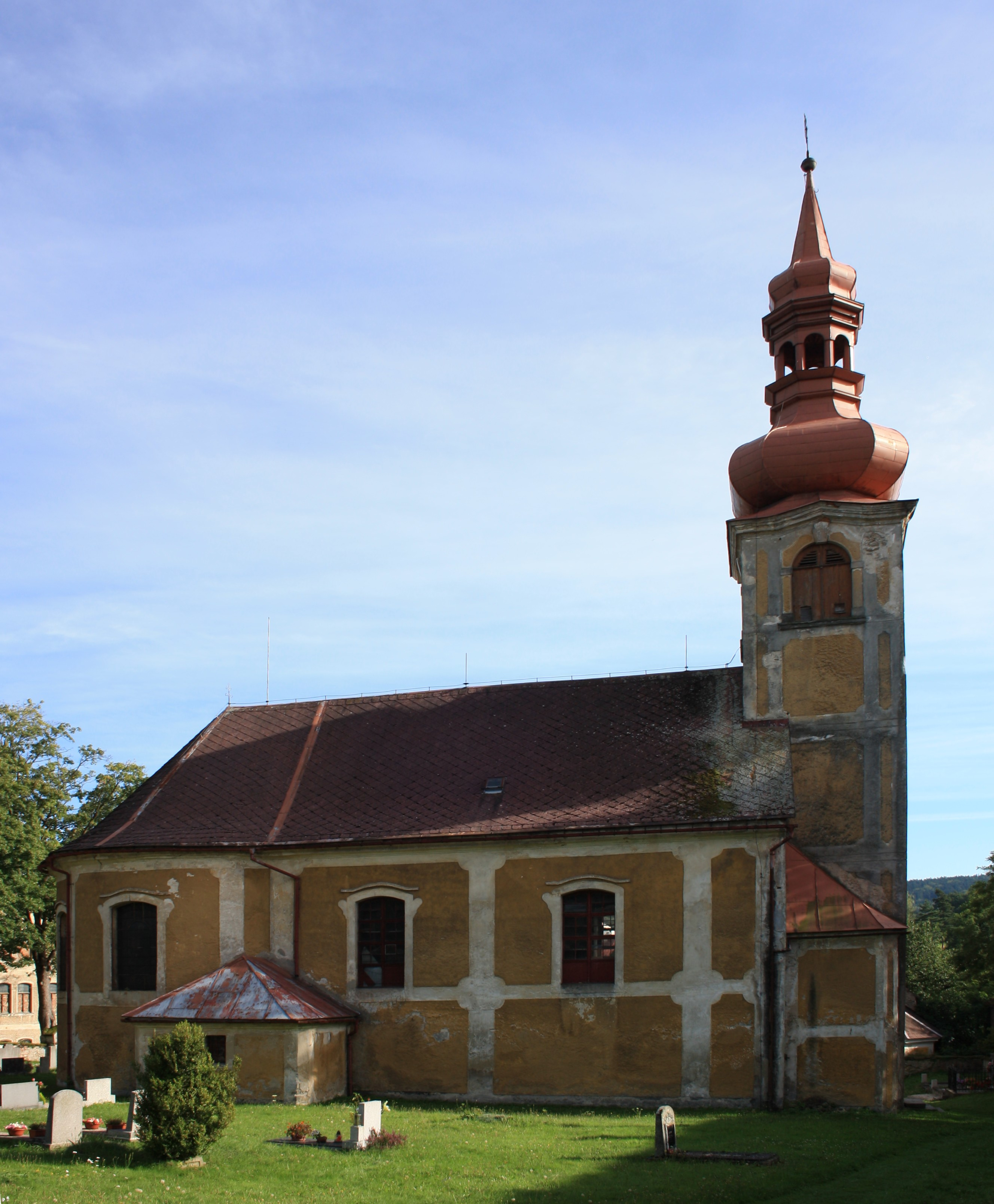 Kostel Nejsvětější Trojice v Jindřichovicích pod Smrkem (pohled od severozápadu).